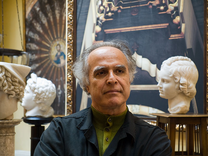 Porträt Architekturfotograf Ahmet Ertuğ